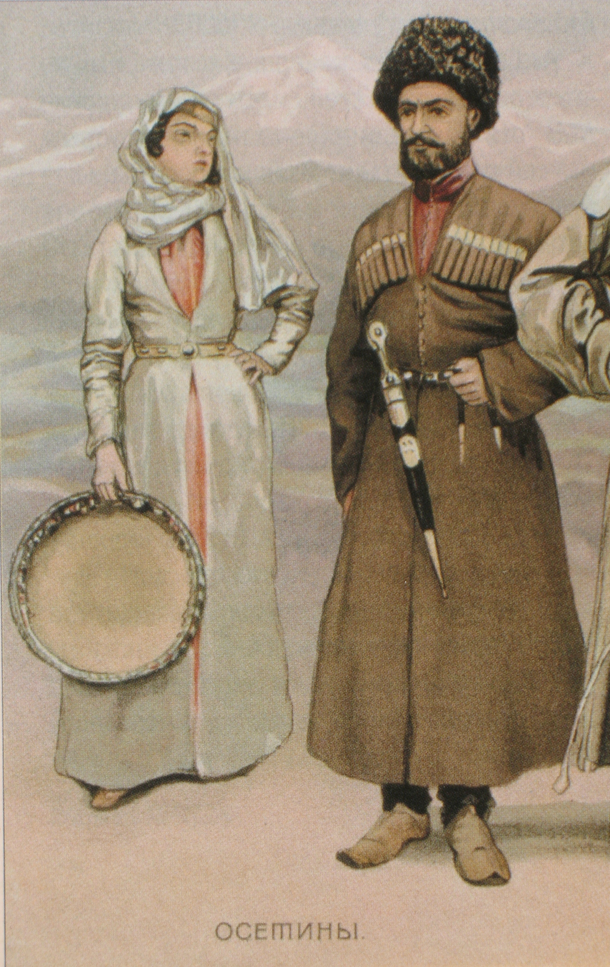 Народы Кавказа. Осетины. Русская литография. Конец 19 века.